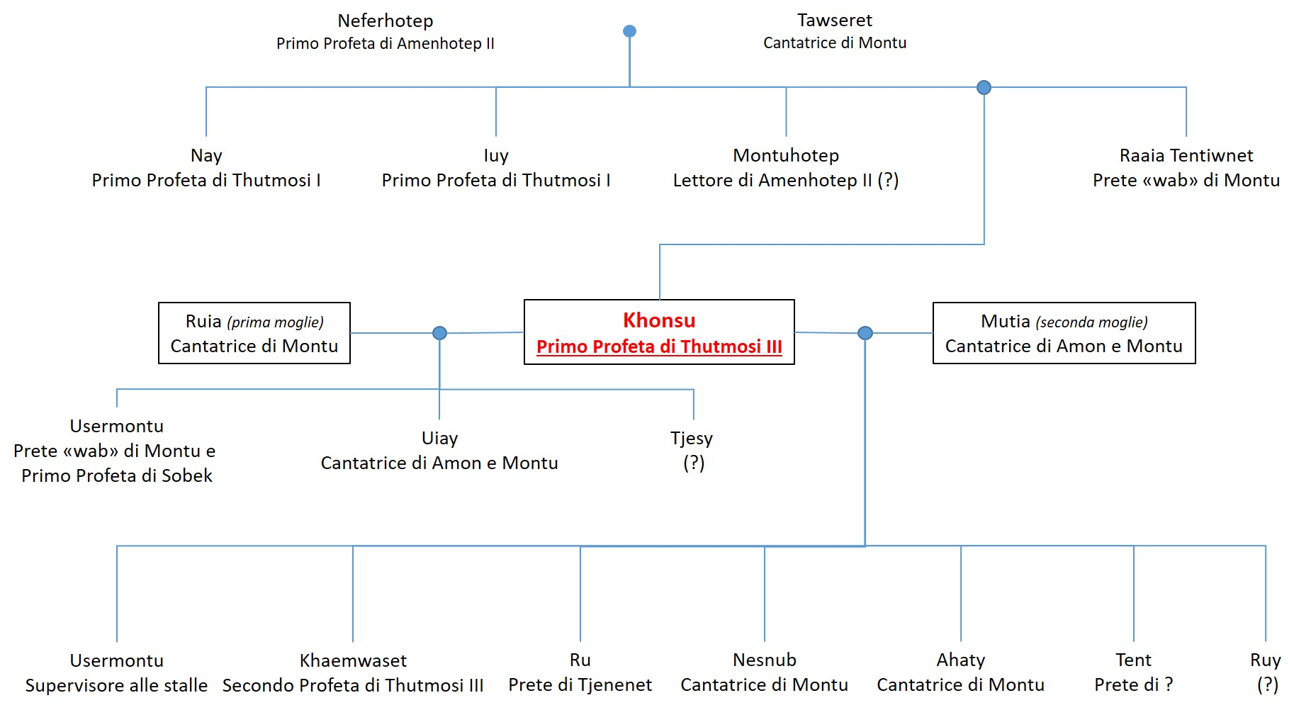 Albero genealogico di Khonsu, titolare della tomba egiziana TT31